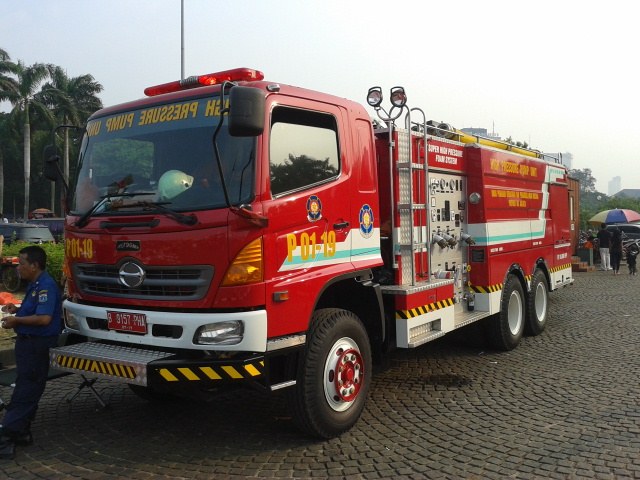 Truk Pemadam Kebakaran DKI Jakarta